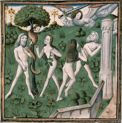 ChampionDesDames-Boccace-Carpentras622-f6vd : Adam et Éve au paradis